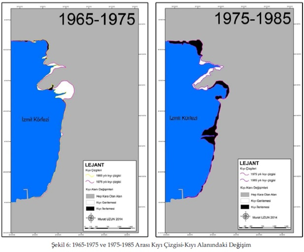 kıyı ilerlemesei şekli